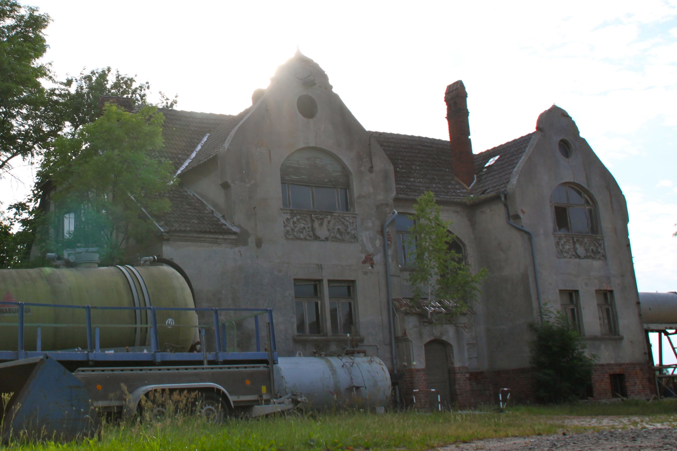 Groß-Ellingen Guthof Heerstraße 9